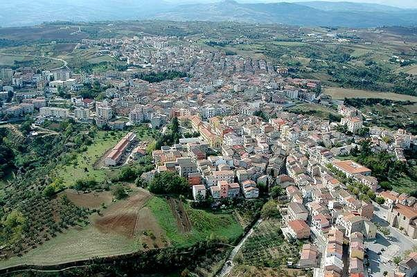 Panoramica aerea di Genzano